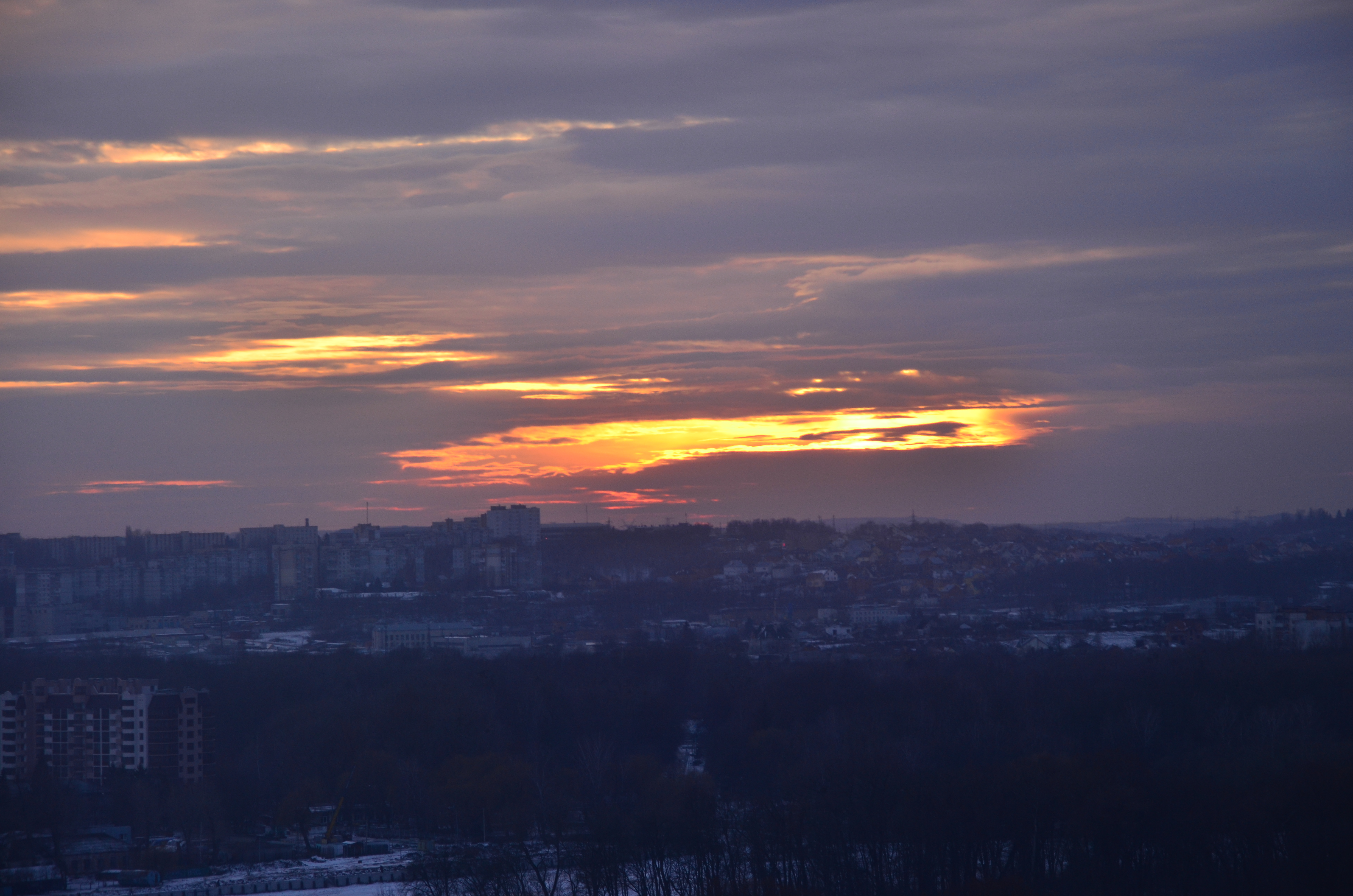 Хмельницкий. Вид с Проспекта Мира на микрорайон Гречаны.